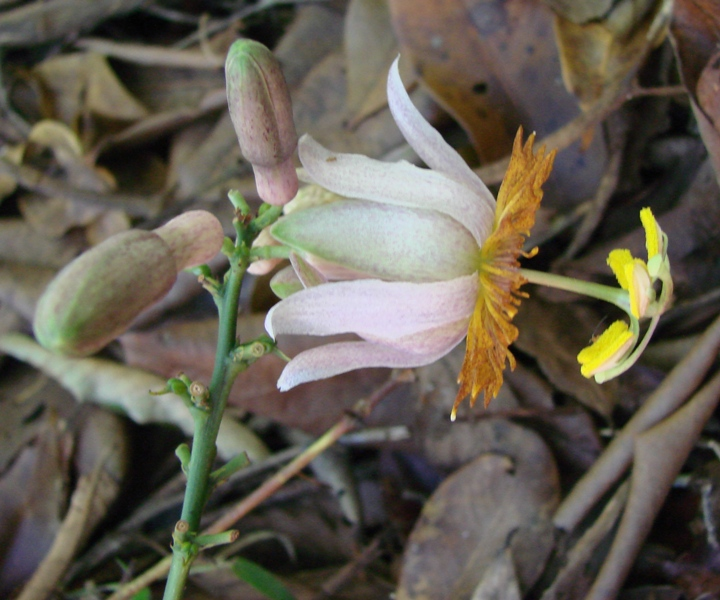 Passiflora cerradensis - PASSIFLORACEAE - Jardim Botânico de Brasília - DF - Brasil